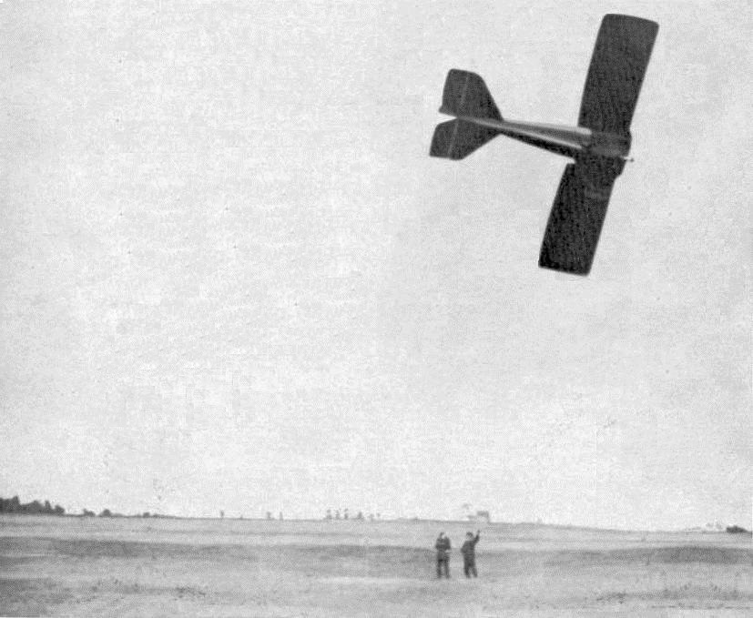 Jules Védrines en septembre 1912 à Chicago (Record mondial de vitesse aérien - Deperdussin moteur Gnôme, magnéto Bosch, bougies Oléo, hélice Chauvière, dans la cadre de la Coupe Gordon Bennett).